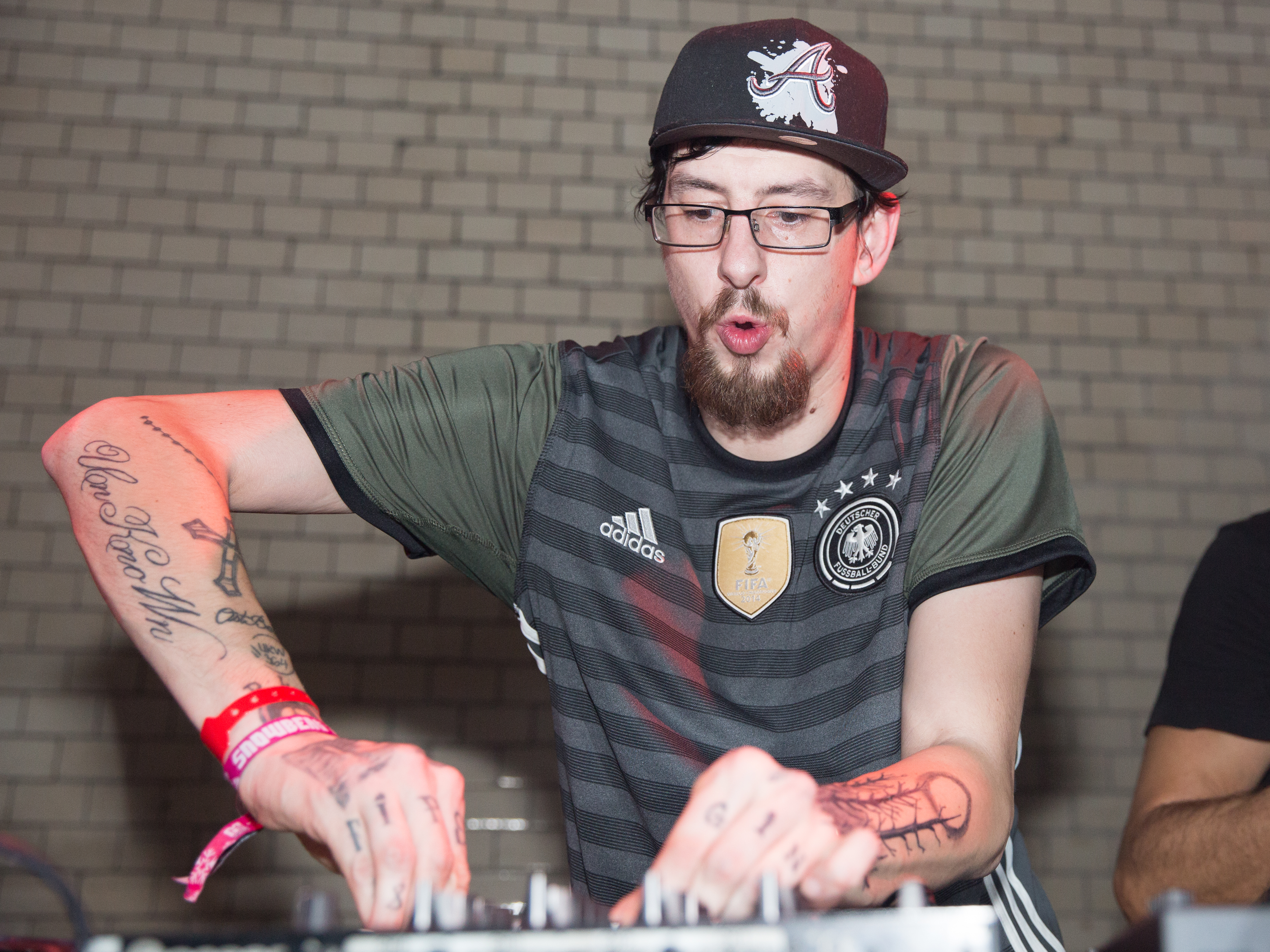 Drauf & Dran (bürgerlich Jonas Mohr) - Dieses Bild ist auf dem Sterne und Bass Festival am 30. Januar 2916 im Berliner E-Werk entstanden.